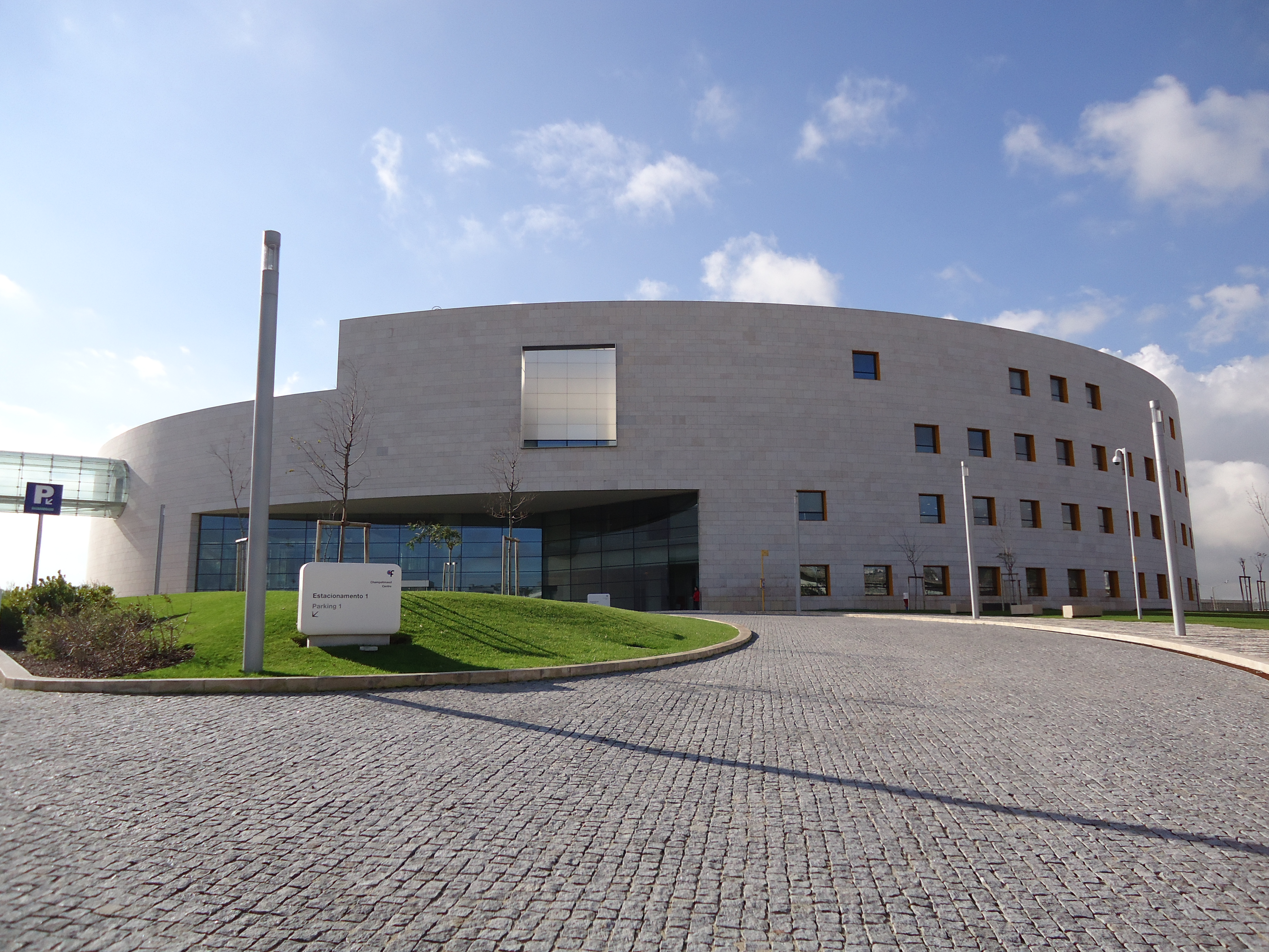 Champalimaud Centre for the Unknown, Lisboa, Portugal: edifício principal.